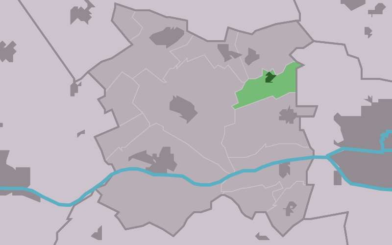 Kaartsje fan himrik fan Ingelum